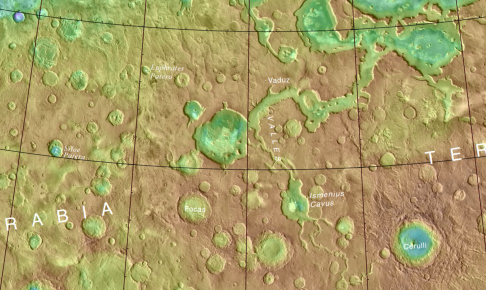 Cráter marciano Focas. Localización. (Imagen IAU/USGS/Goddard/A SU/USGS)